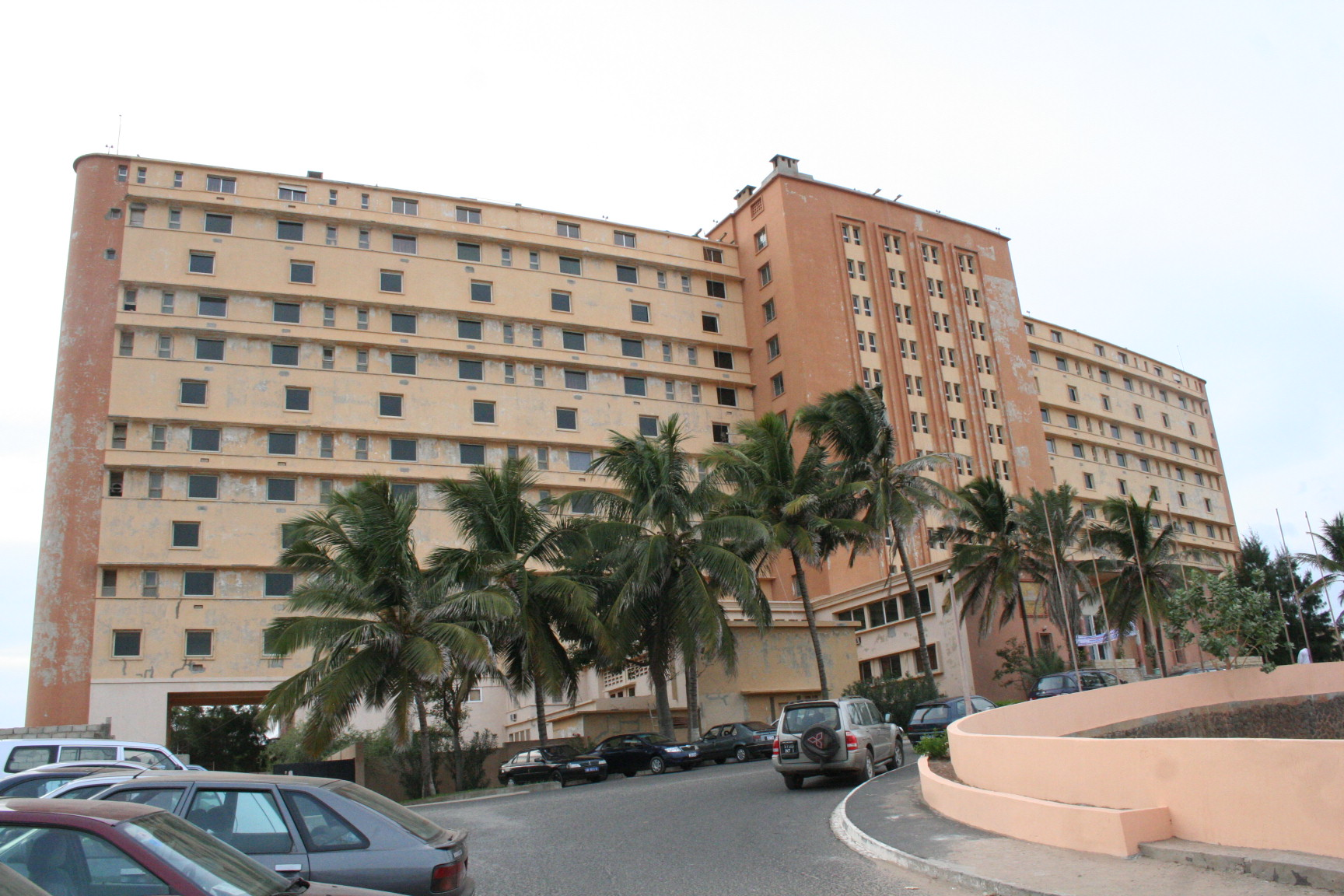 Hotel Ngor Diarama Dakar ( Senegal )